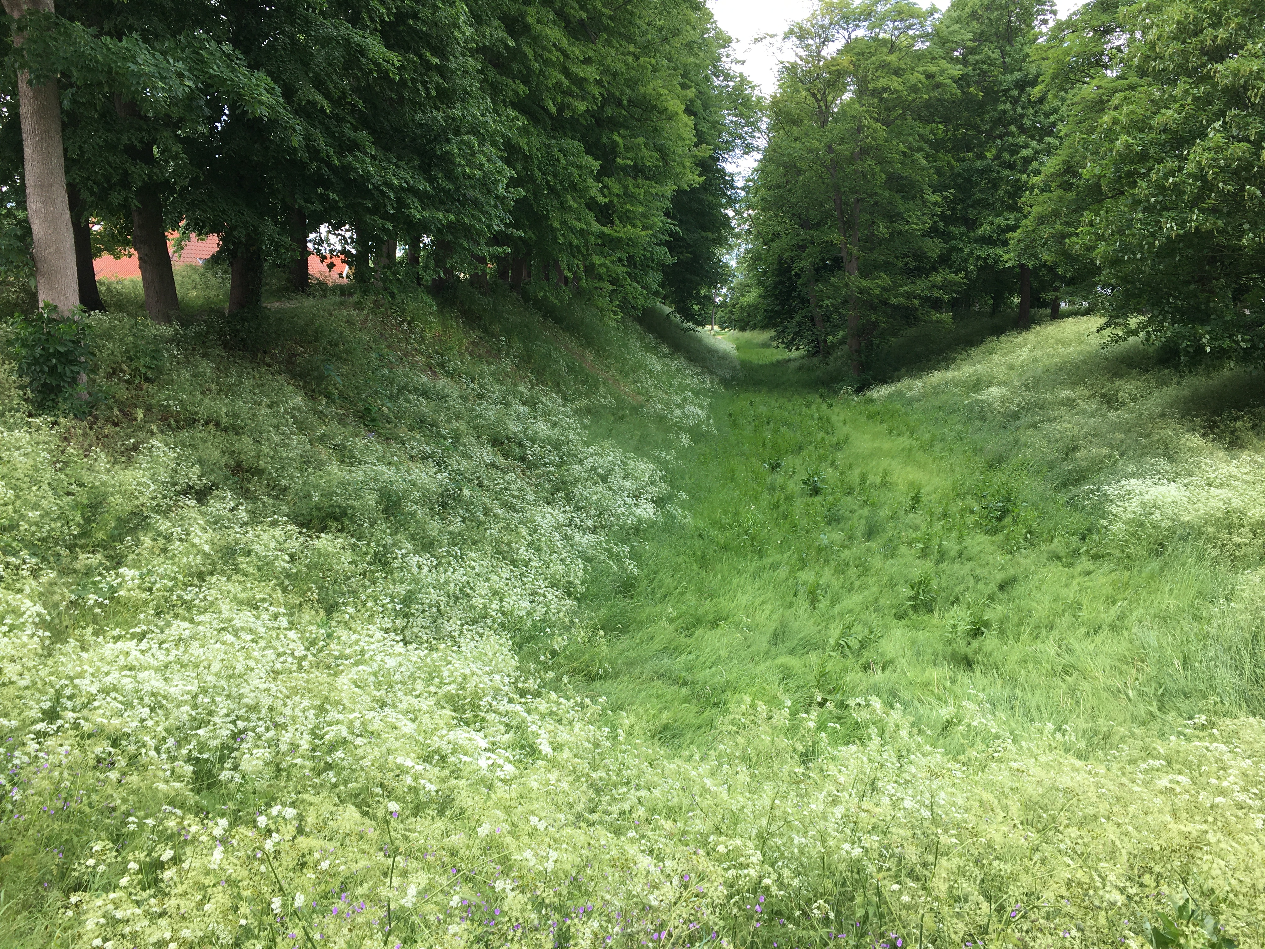 Se fra Mølleporten